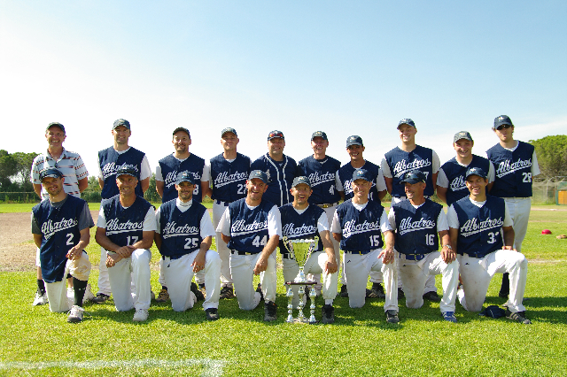 Photo de l'équipe senior des Albatros de La Grande Motte